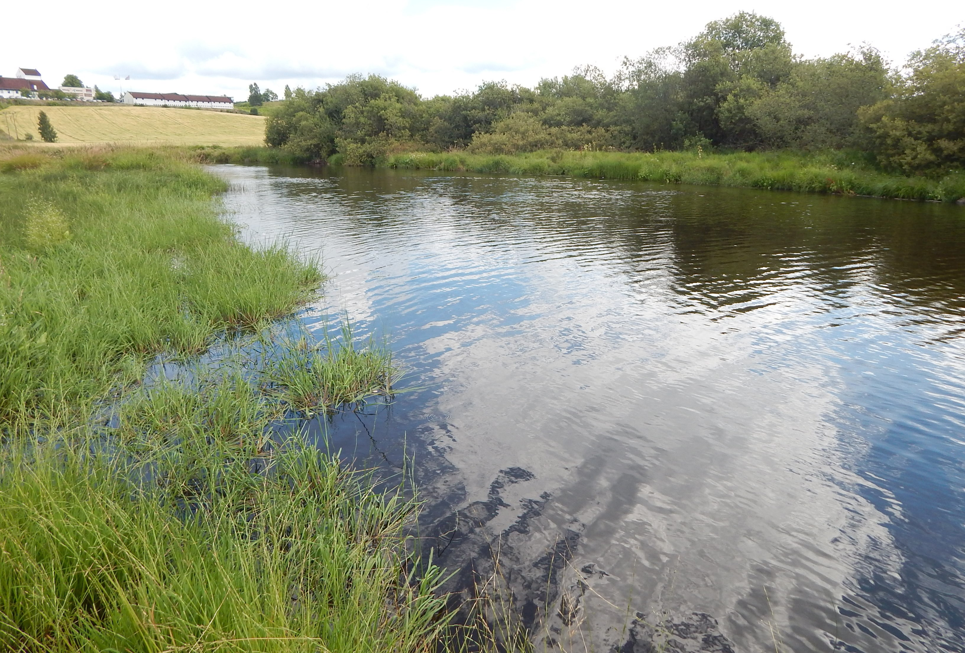 Flagstadelva like øst for E6, i deltaet